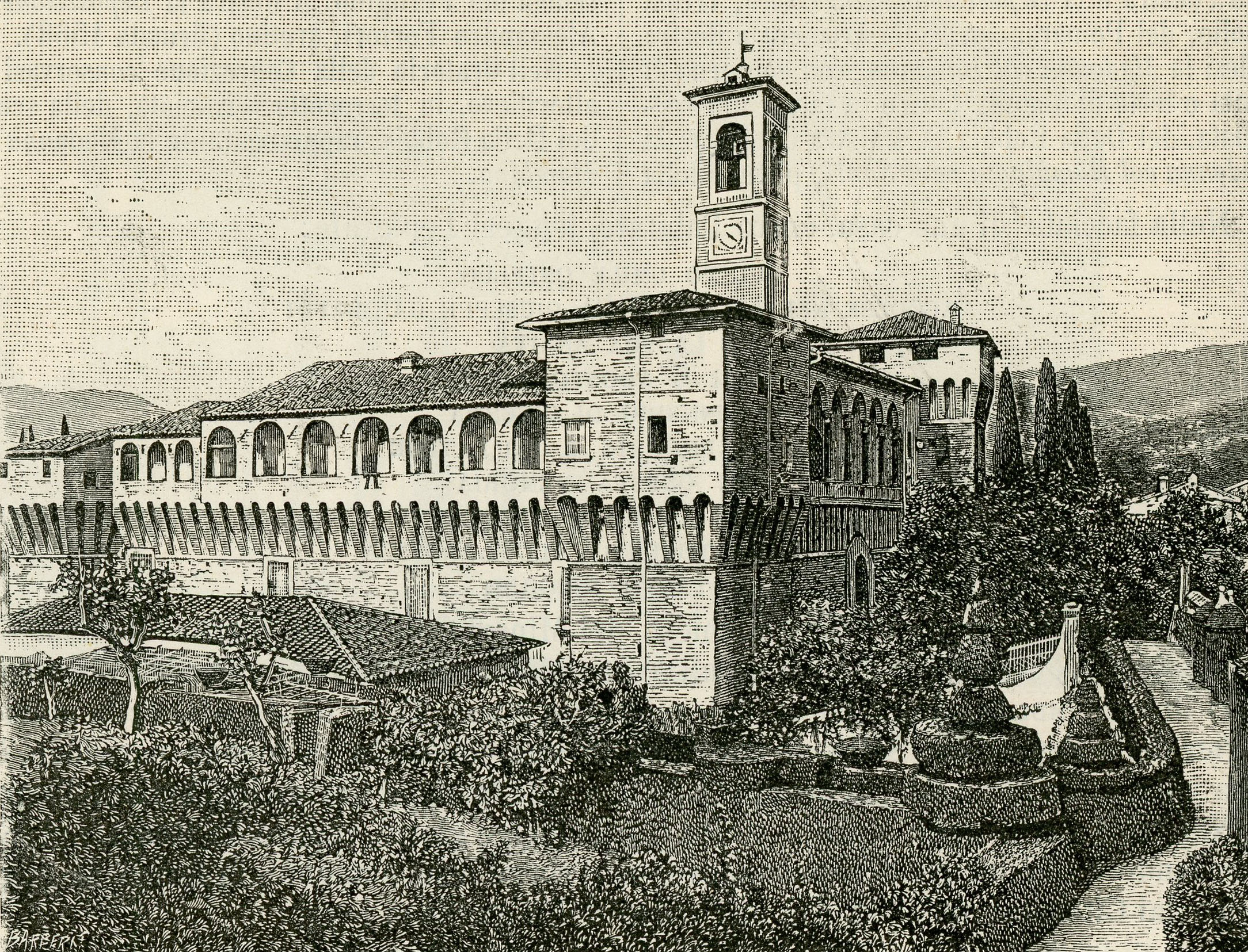 San Giustino: villa Bufalini (xilografia).